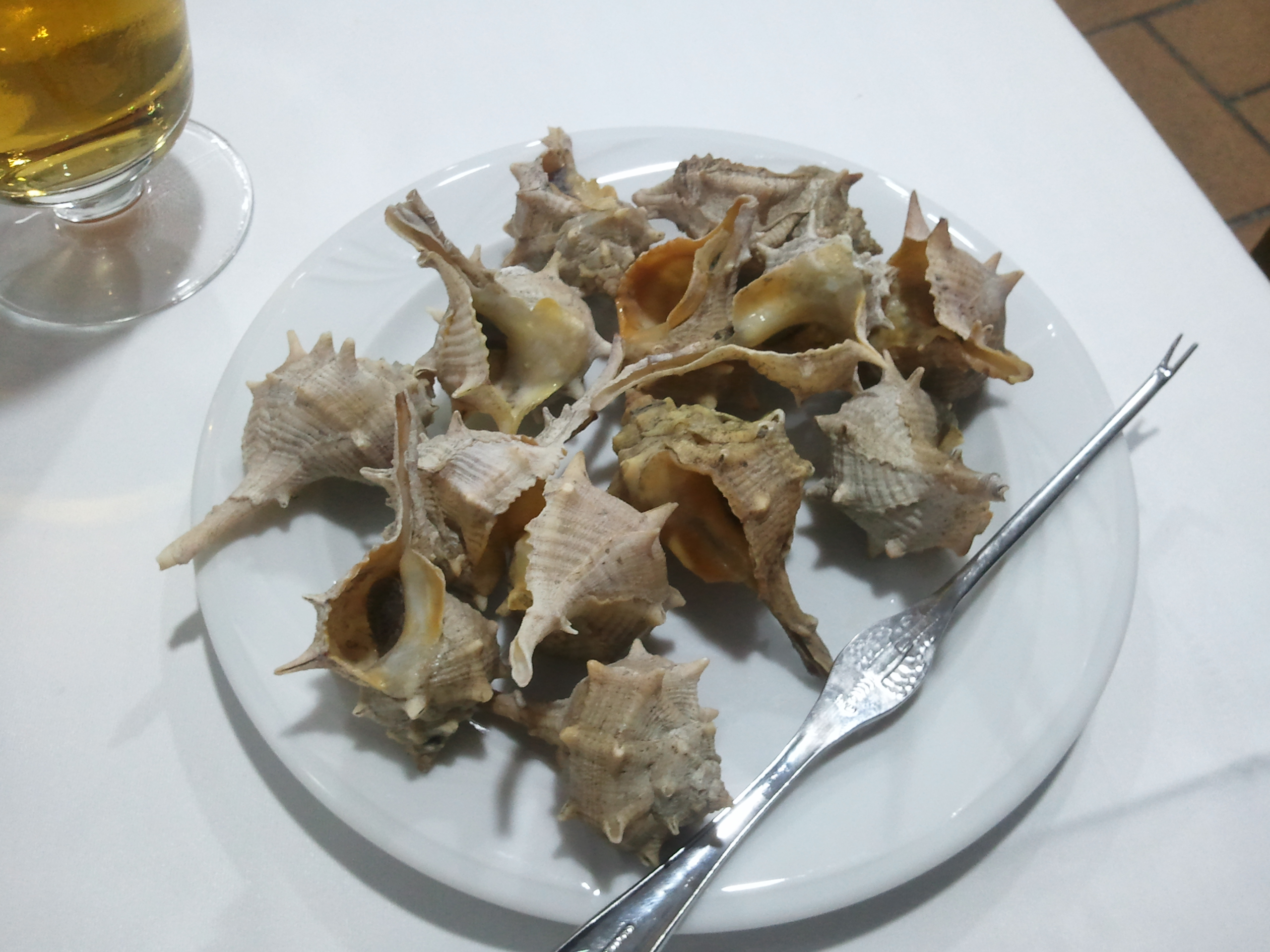 Canaíllas (Bolinus brandaris), Chiclana, Cádiz